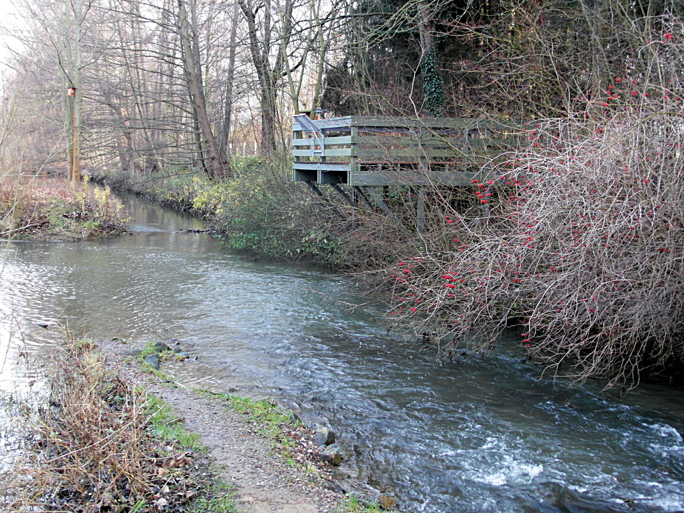 Die Renaturierte Ihme bei Kückenmühle mit vom NABU errichteter Aussichtsplattform